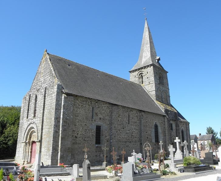 Vue méridionale de l'église Saint-Loup à Saint-Loup (50).